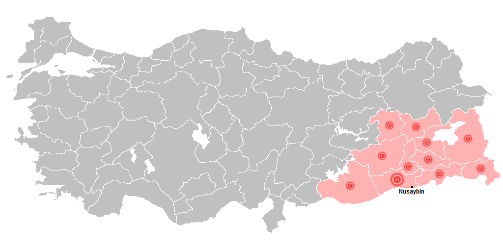 1990 yılında PKK'lıların başkaldırmalı